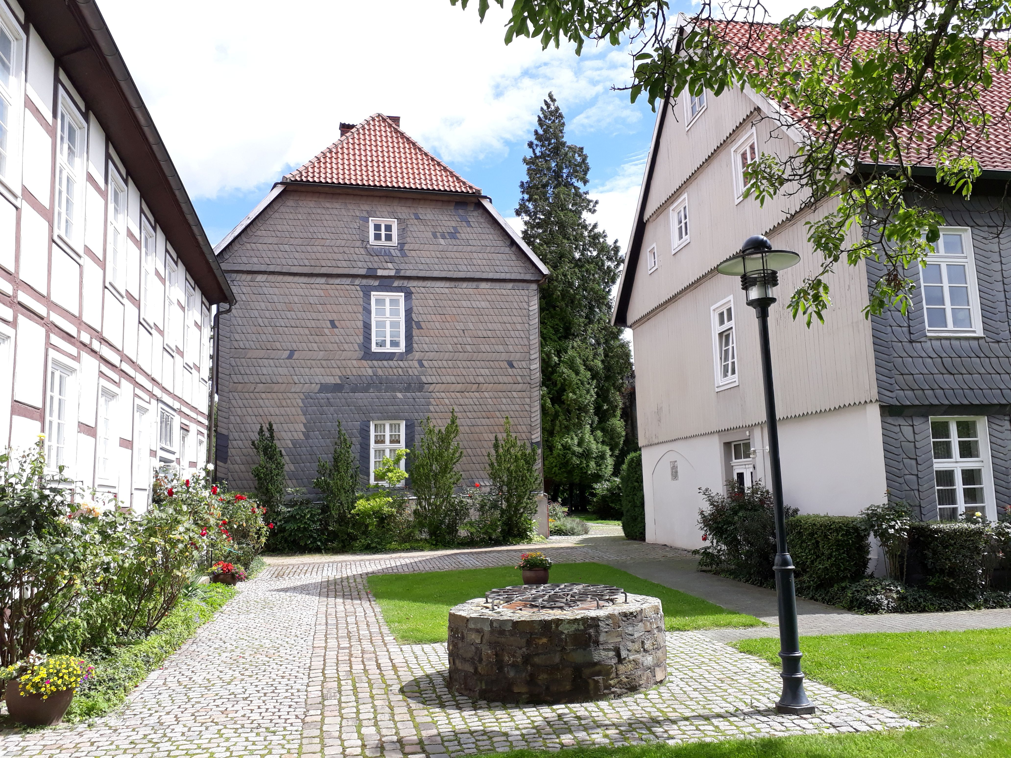 An der Stiftsruine Lippstadt. Laut Platte in: Heimatblätter [...] Lippstadt 71 (1991), S. 121 (Bildunterschrift) war damals das Haus links eines der Stiftsdamenhäuser, das Gebäude rechts die Verwaltung und die Hausmeisterwohnung.